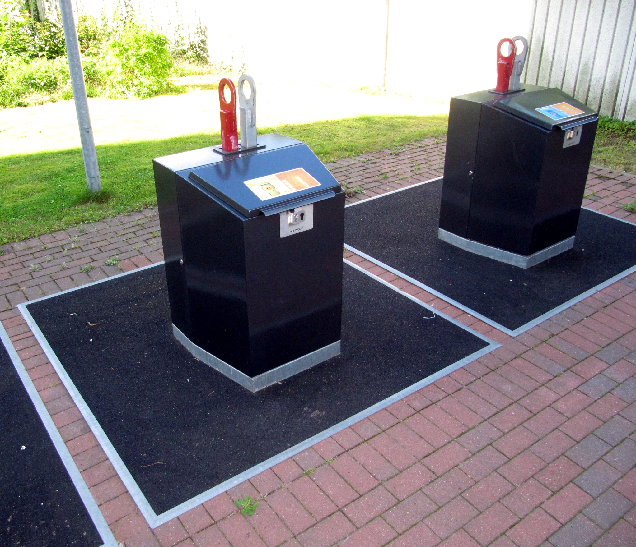 Unterflur-Müllcontainer der Stadtreinigung Hamburg